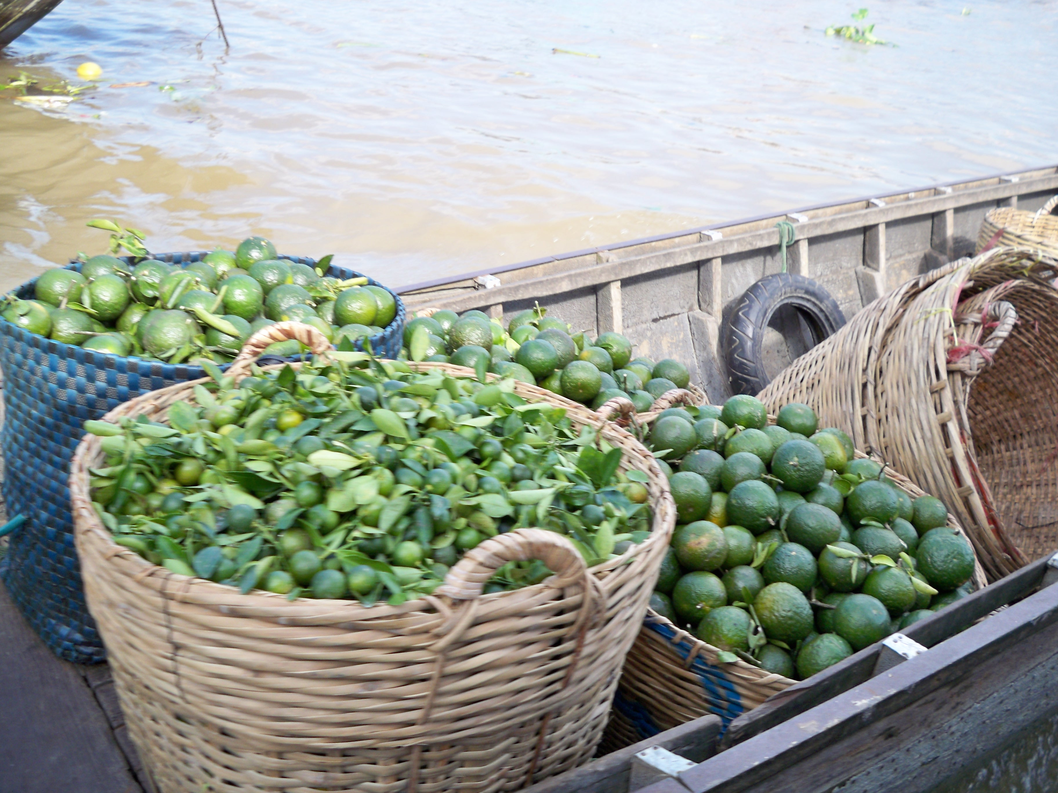 Cho noi phong dien